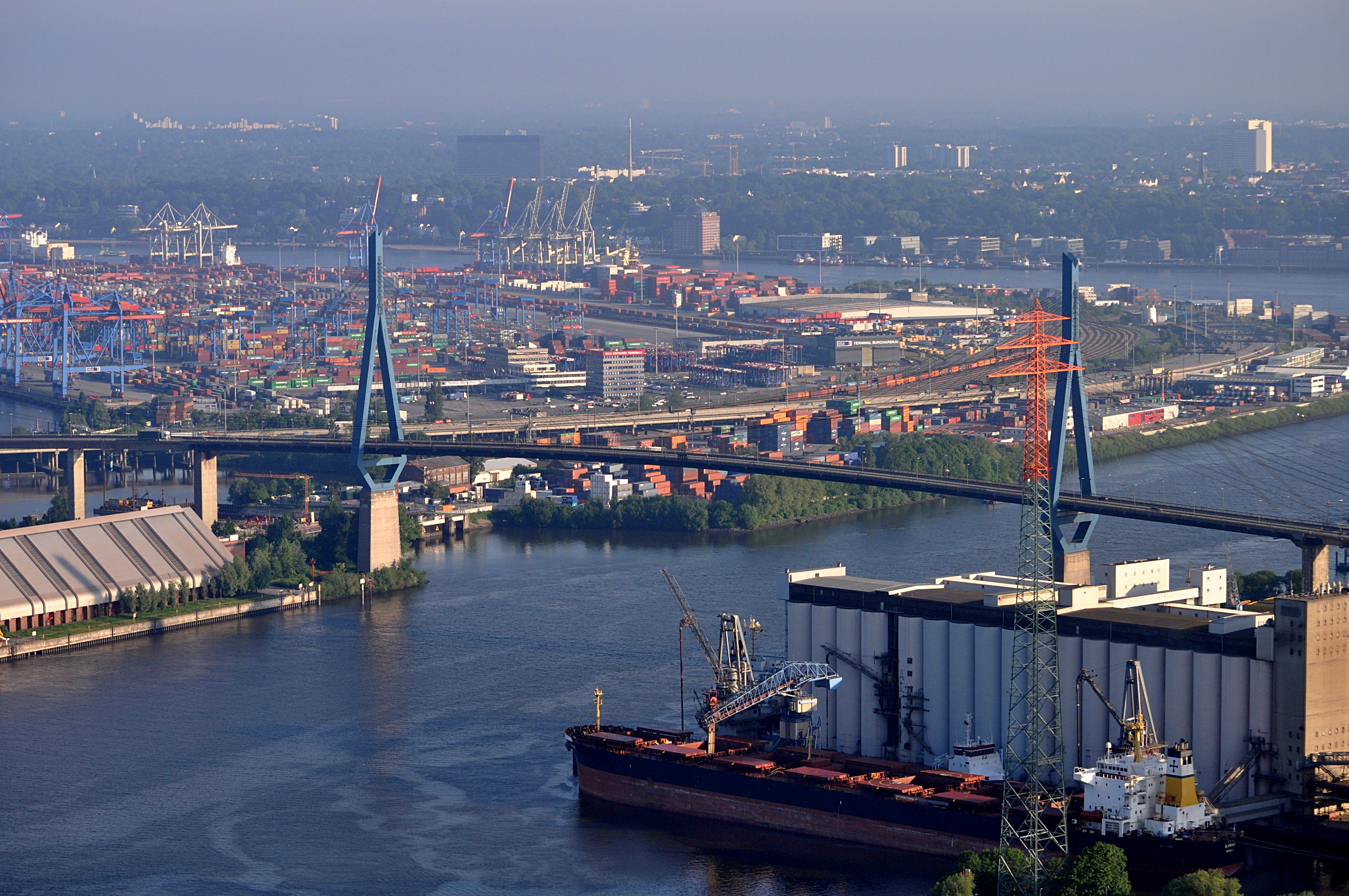 Die Köhlbrandbrücke über den Köhlbrand in Hamburg.